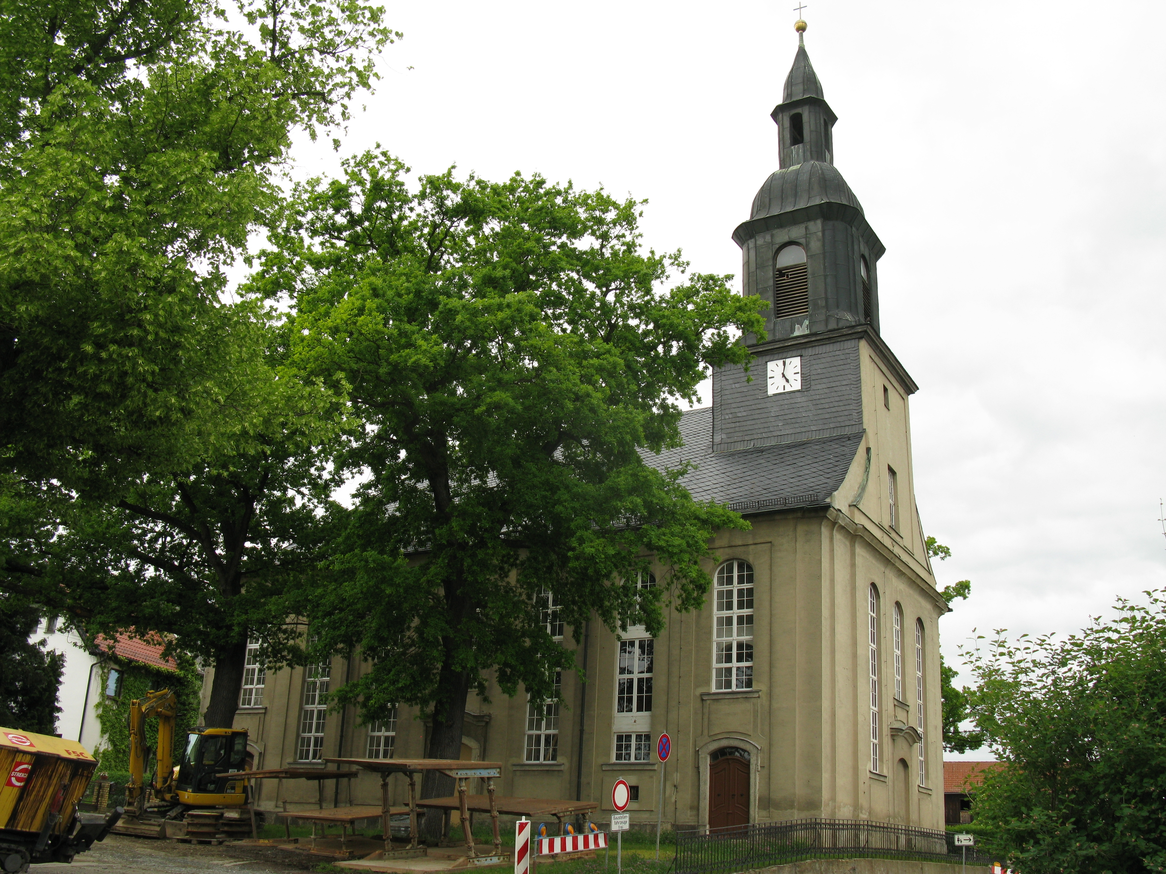 Plauen-Oberlosa, denkmalgeschützte Stephanuskirche am Kirchplatz (Kirchplatz 411a).